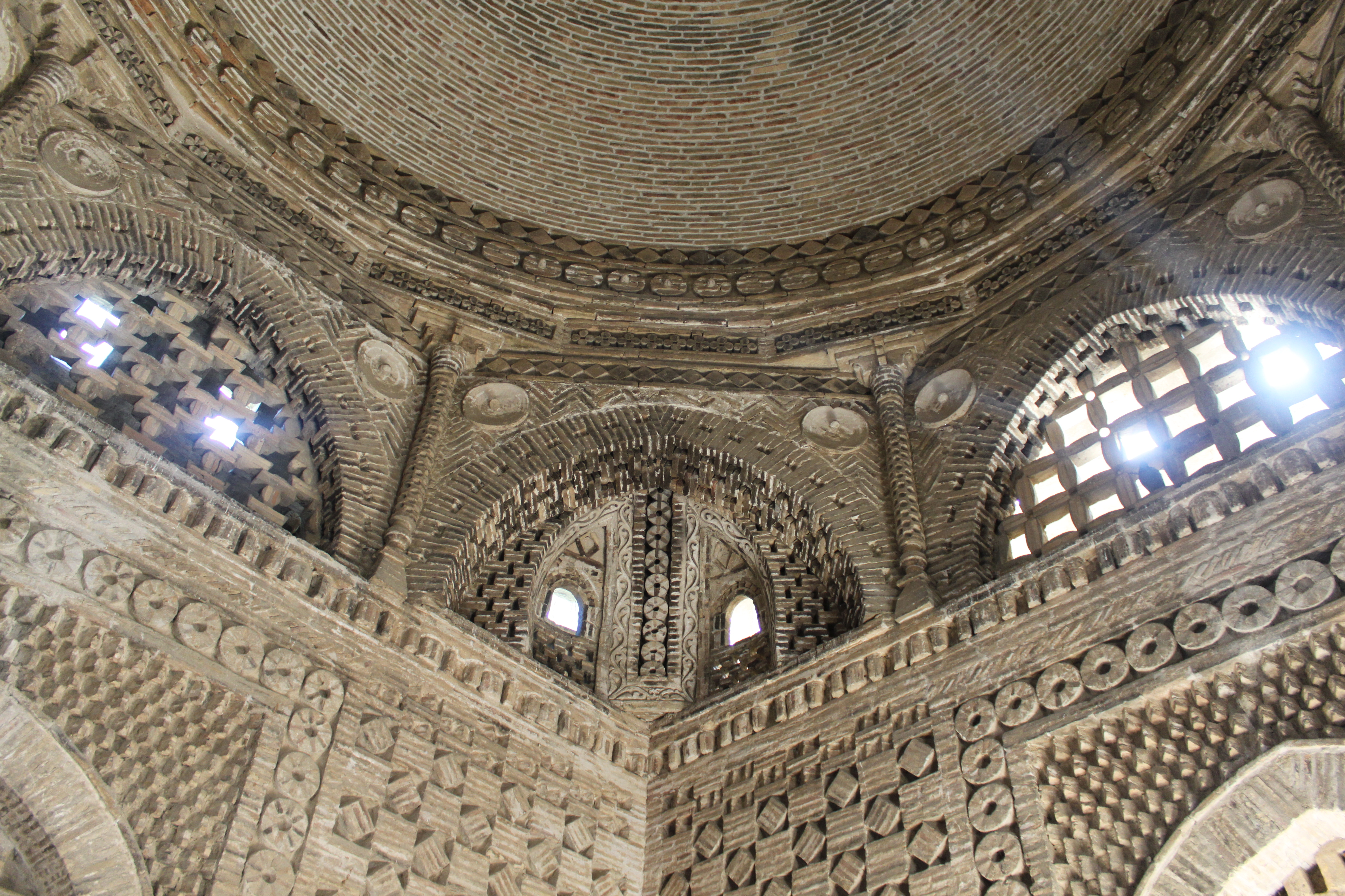 Le dôme du mausolée samanide à Boukhara, à l'intérieur